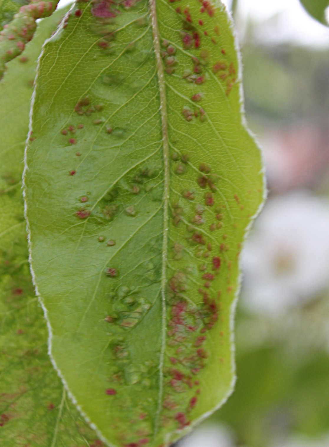 Vlnovník hrušňový (Eriophyes pyri) , Brno-Komín, hrušeň